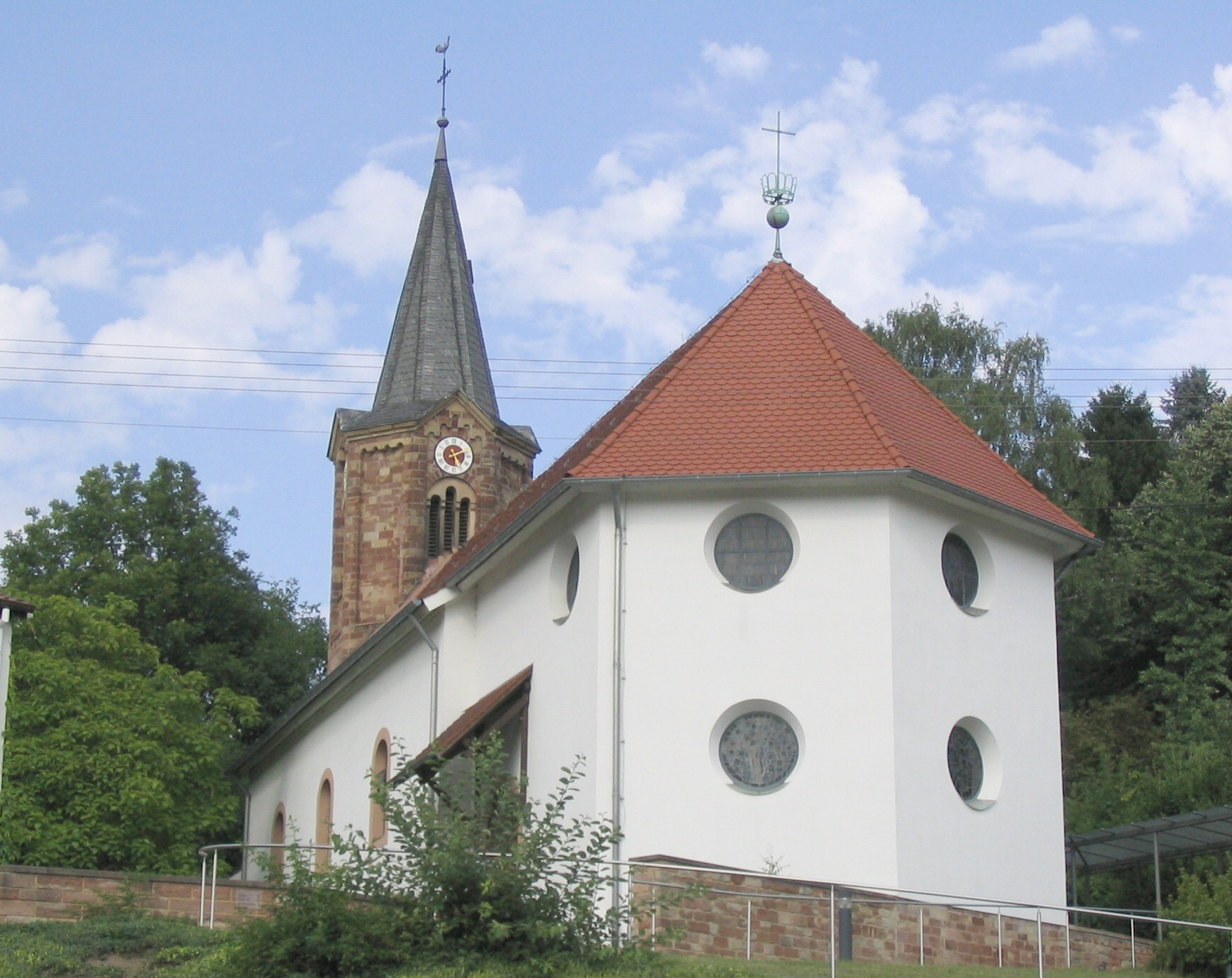 Beschreibung: Evangelische Kirche in Scheidt (Saarbrücken/Deutschland). Photographer: kh80 Date: 2005-07-28 License: GFDL and cc-by-sa/2.0/de